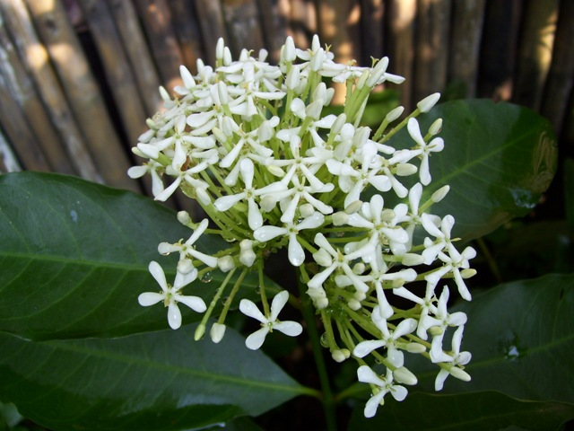 Bunga Soka (Ixora javanica), taken from own garden in Cinere, Sawangan, Depok, West Java-Indonesia